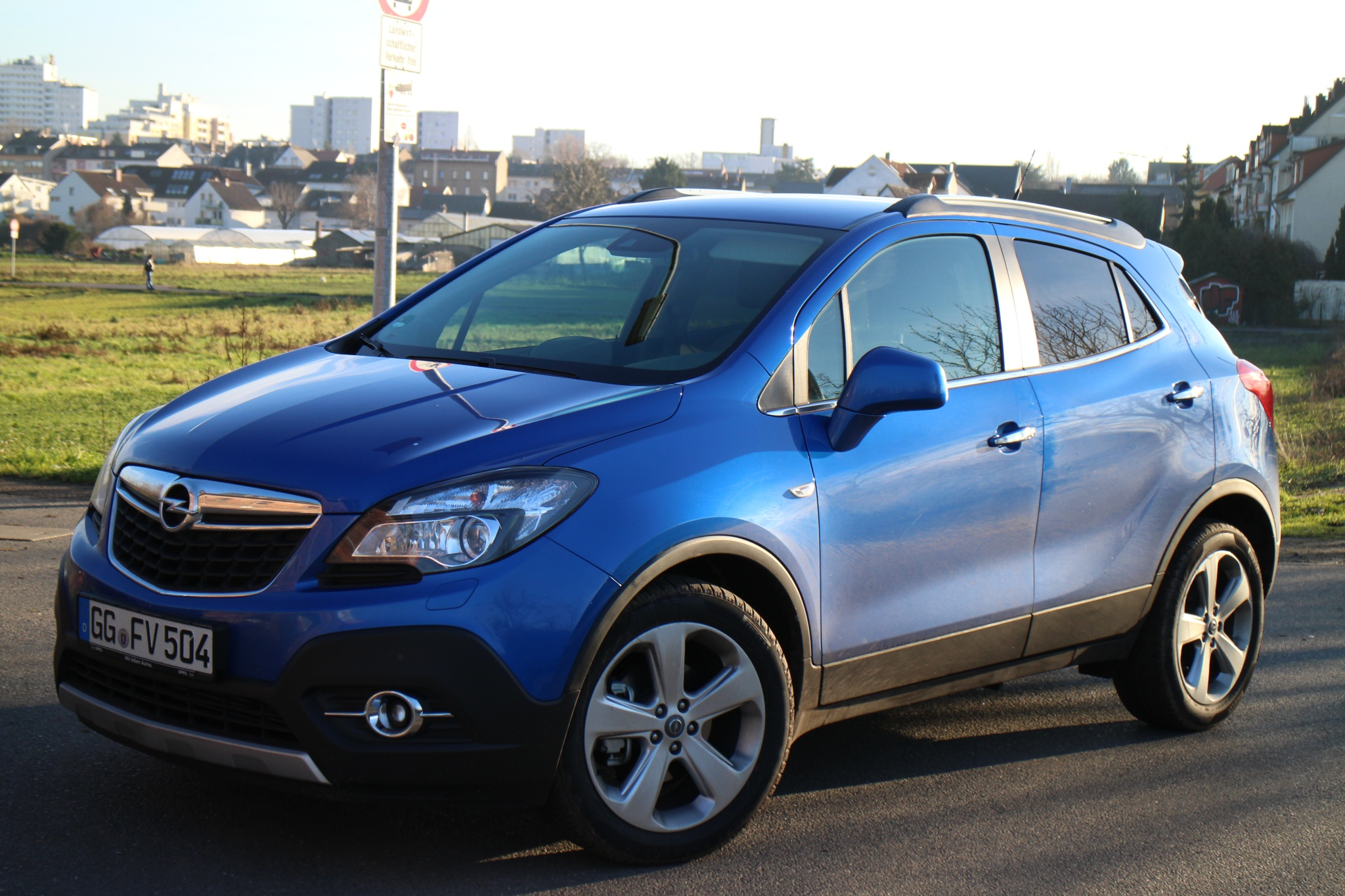 Opel Mokka 1.4 EcoFlex